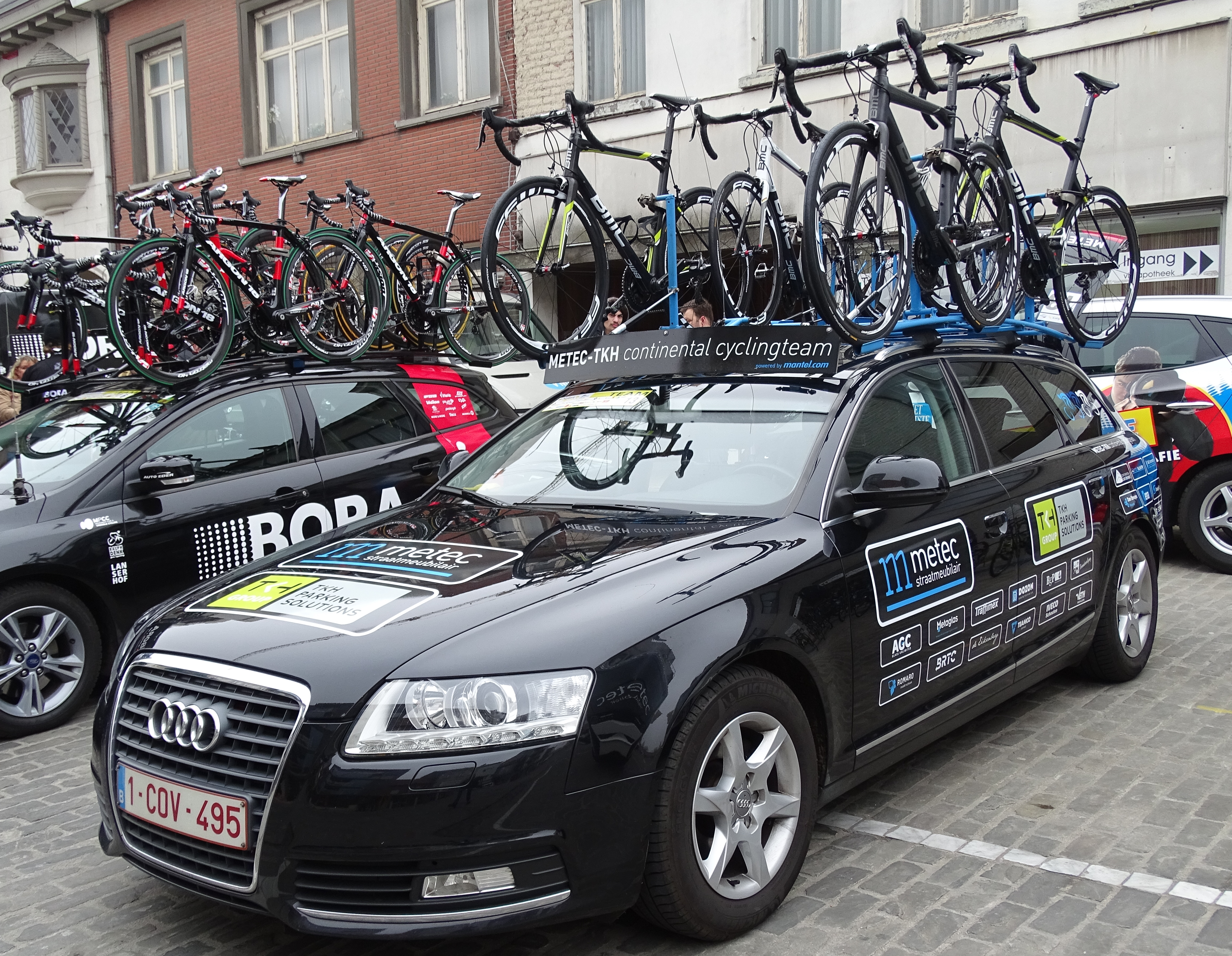 Reportage réalisé le mercredi 18 mars à l'occasion du départ de la Nokere Koerse 2015 à Deinze, Belgique.